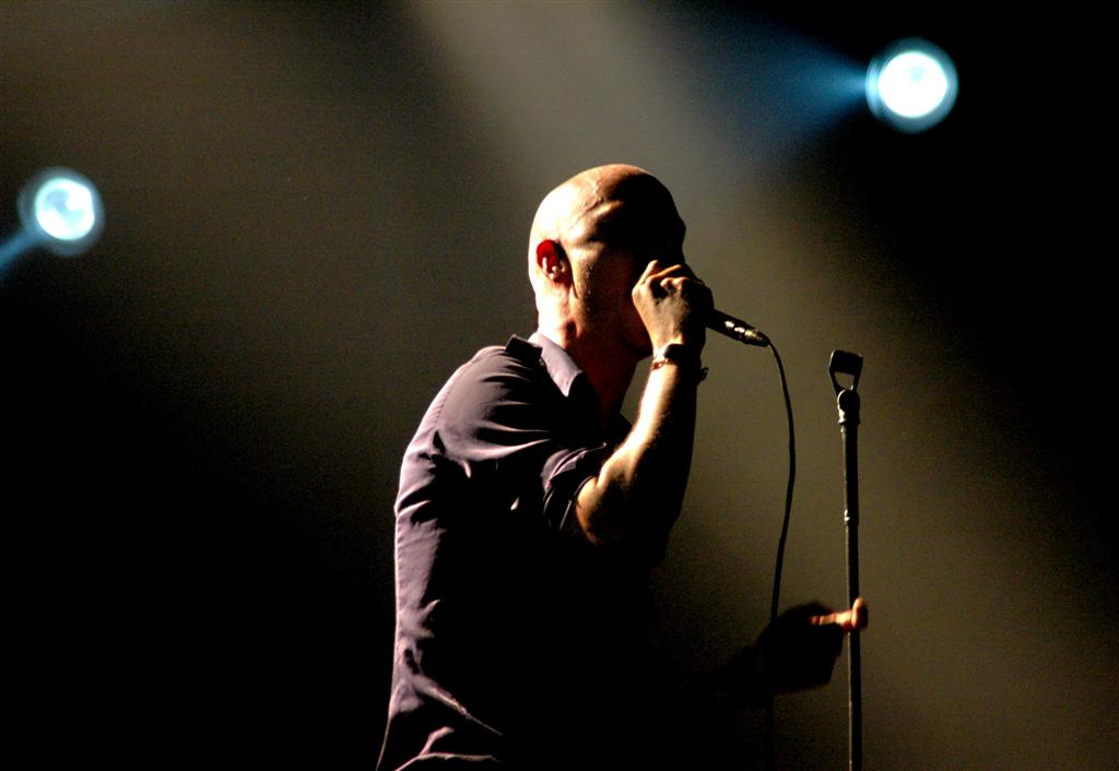 Bildet er tatt under Vikedal Roots Music Festival i 2006. Bildet viser vokalisten i Madugada.